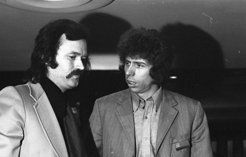 Bundesparteitag der SPD in Hannover (rechts: Johano Strasser) 10.-14.4.1973